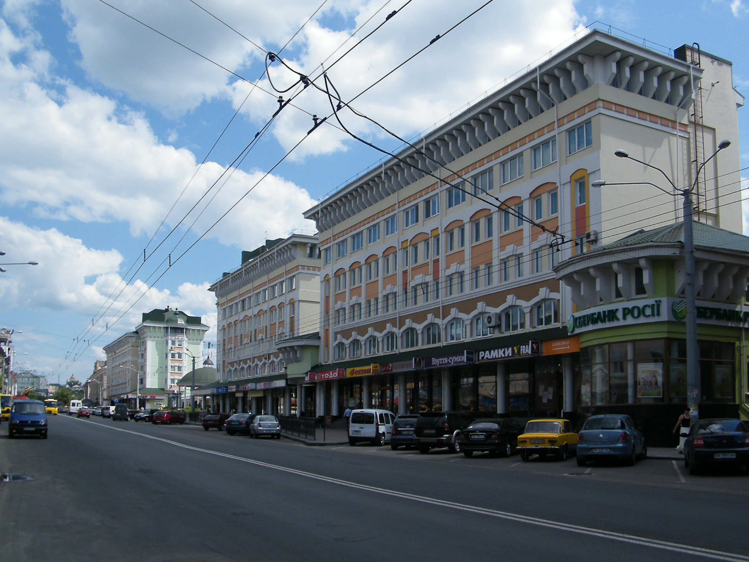 Соборная улица